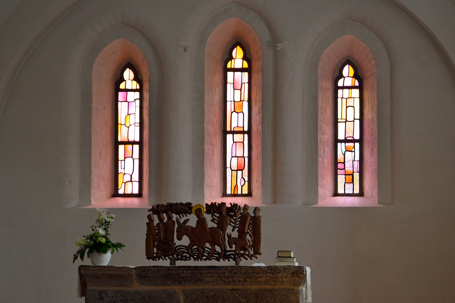 Oksböl, Dänemark, Datum/Uhrzeit: 19.05.2013 13:13:11